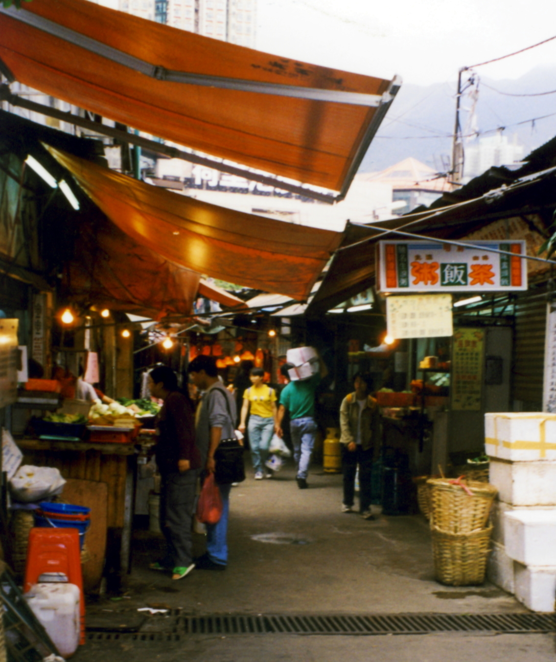 Tai Hom Village Shops